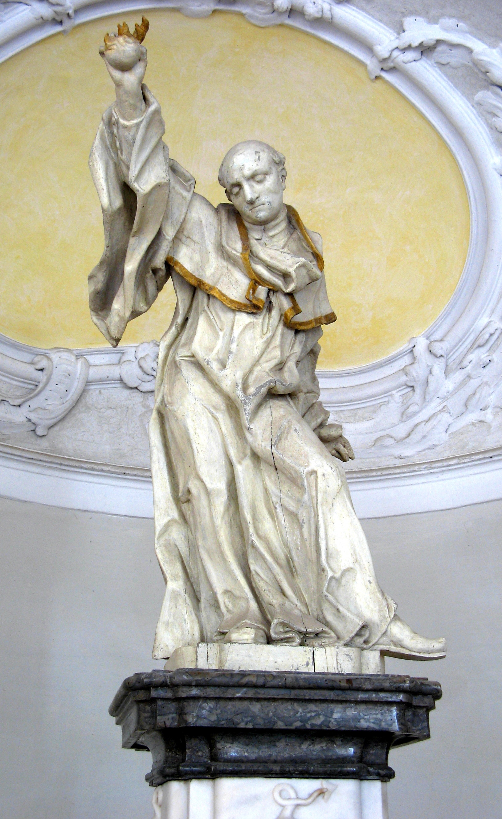 Statue des hl. Magnus von Anton Sturm im Kloster St. Mang in Füssen